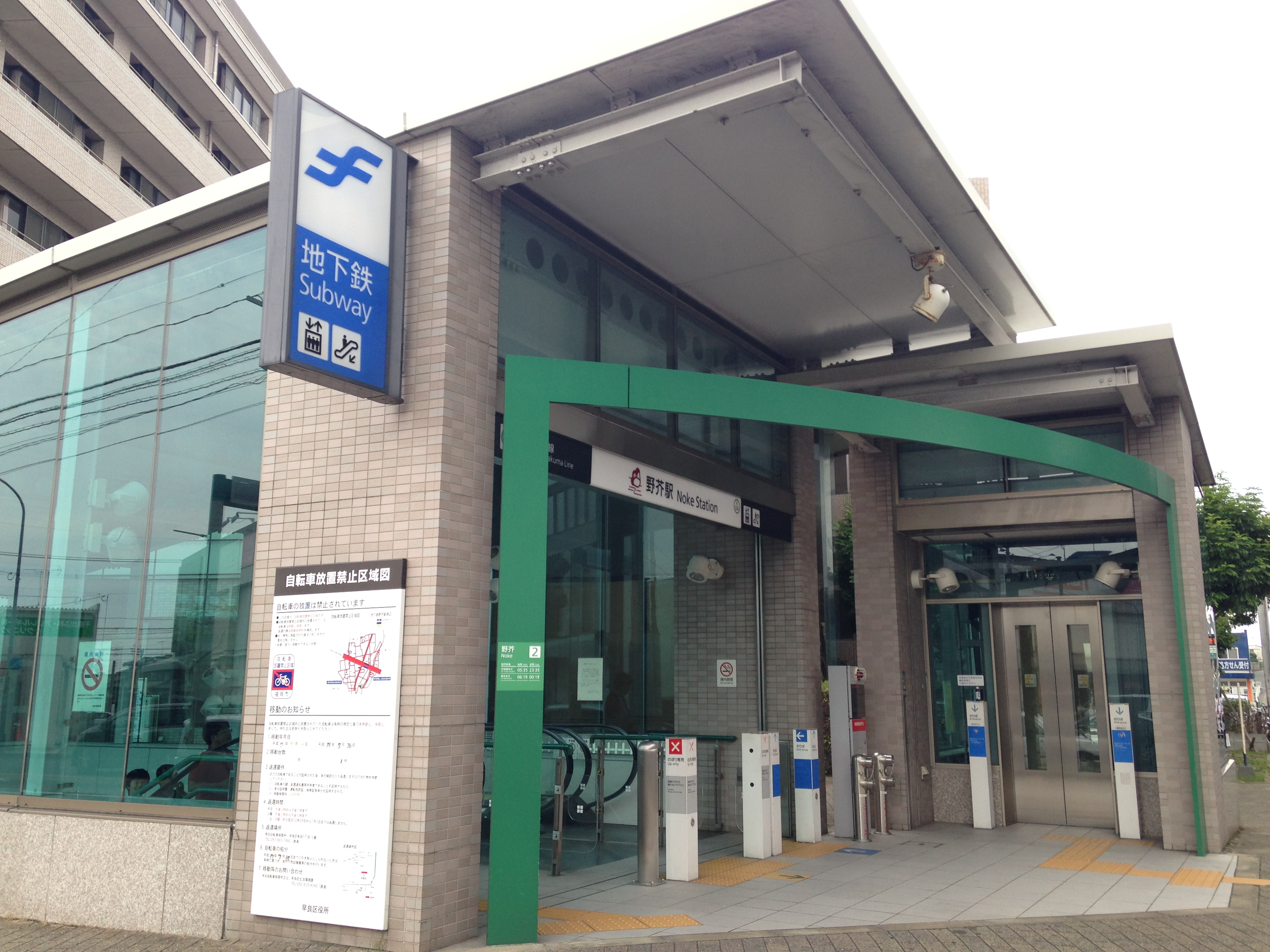 野芥駅の2番出入口